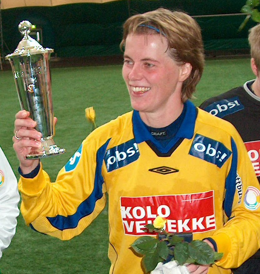 Fotballspilleren Brit Sandaune etter sitt siste seriemesterskap i 2003.